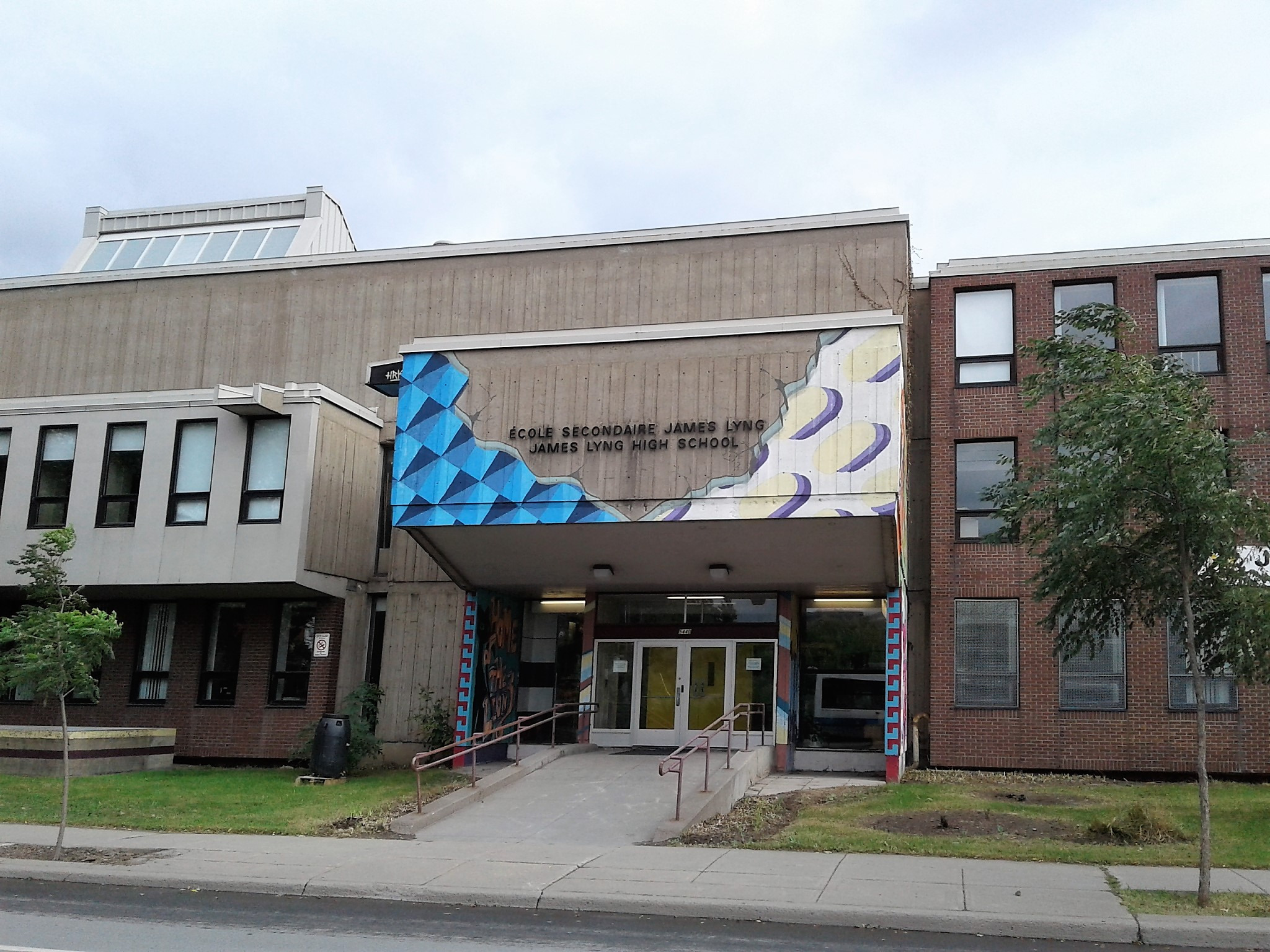 École secondaire James Lyng, 5440, rue Notre-Dame Ouest, Montréal